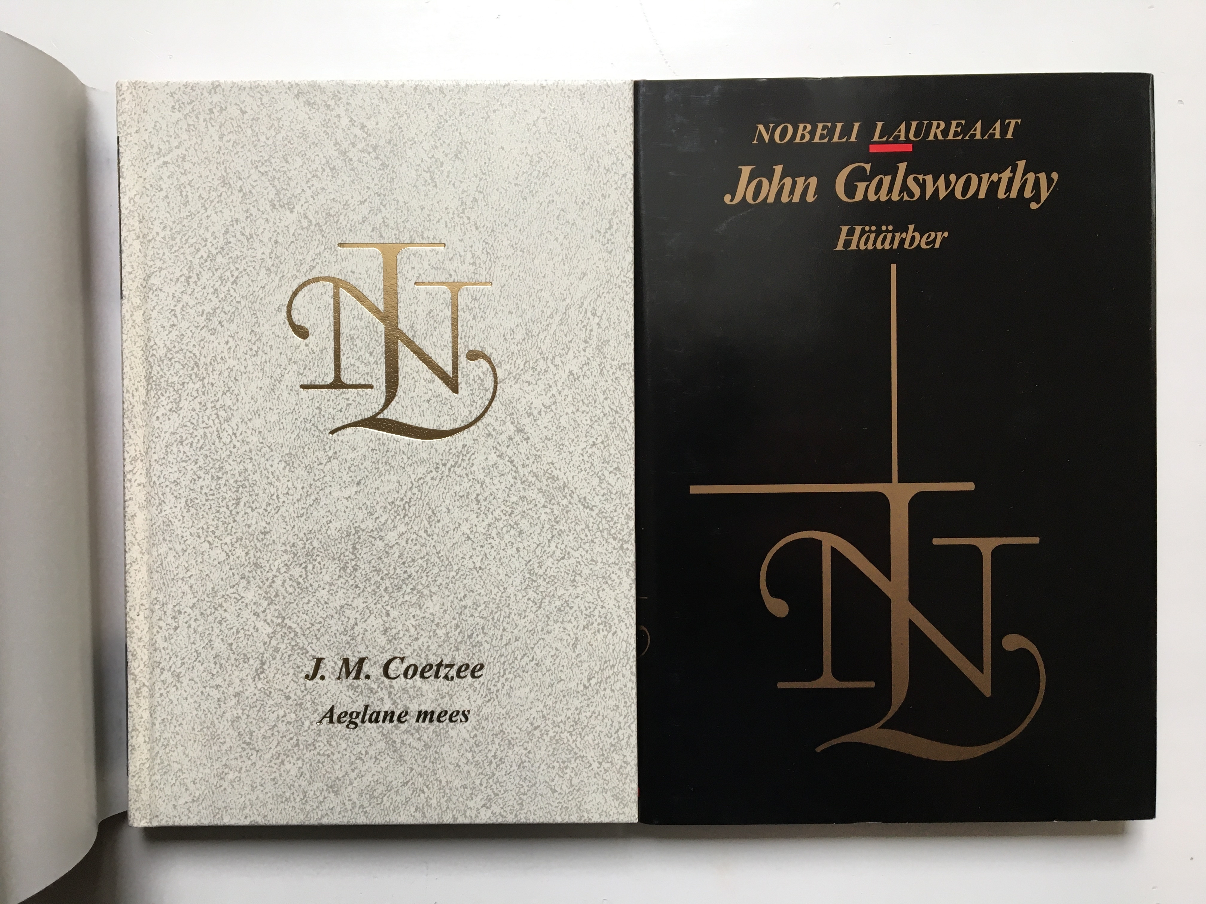 Nobeli kaanekujundus